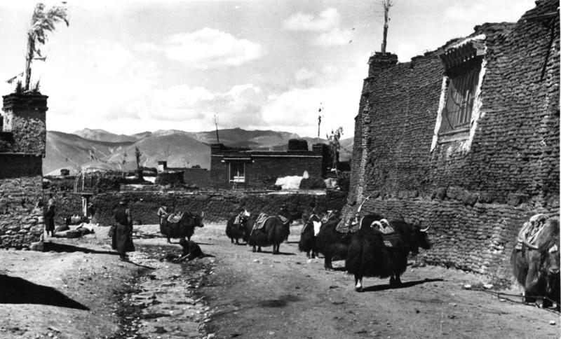 Phari, Haustiere, Yaks